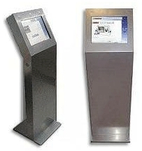 Le e-commerce,.